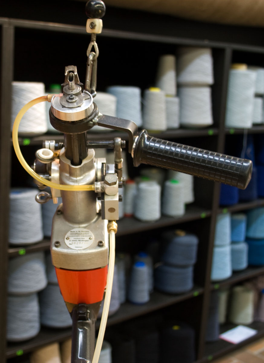 Tuftmachine, Hofmann (Nördlingen), 1986 (07366) Handtufter. Tuftmachine(1986)